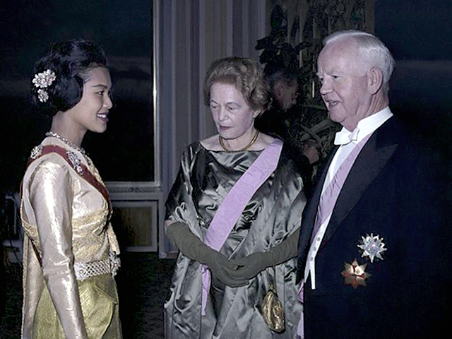 Petersberg, Staatsempfang für König von Thailand Empfang für das thailändische Königspaar auf dem Petersberg [Bundespräsident Heinrich Lübke und Gattin Wilhelmine mit der Königin von Thailand, Sirikit] Abgebildete Personen: Lübke, Heinrich: Bundespräsident, Bundesminister für Ernährung, Landwirtschaft und Forsten, CDU, Bundesrepublik Deutschland Lübke, Wilhelmine: Gattin des Bundespräsidenten Heinrich Lübke, Bundesrepublik Deutschland# (GND 118809253) Somdet Phra Nangchao Sirikit Phra Boromarachininat: Königin Sirikit von Thailand